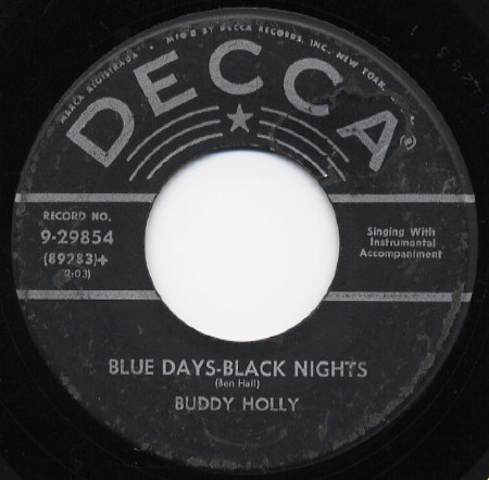 Es una foto del sencillo "Blue Days, Black Nights", de la discográfica Decca, el singles es de Buddy Holly.